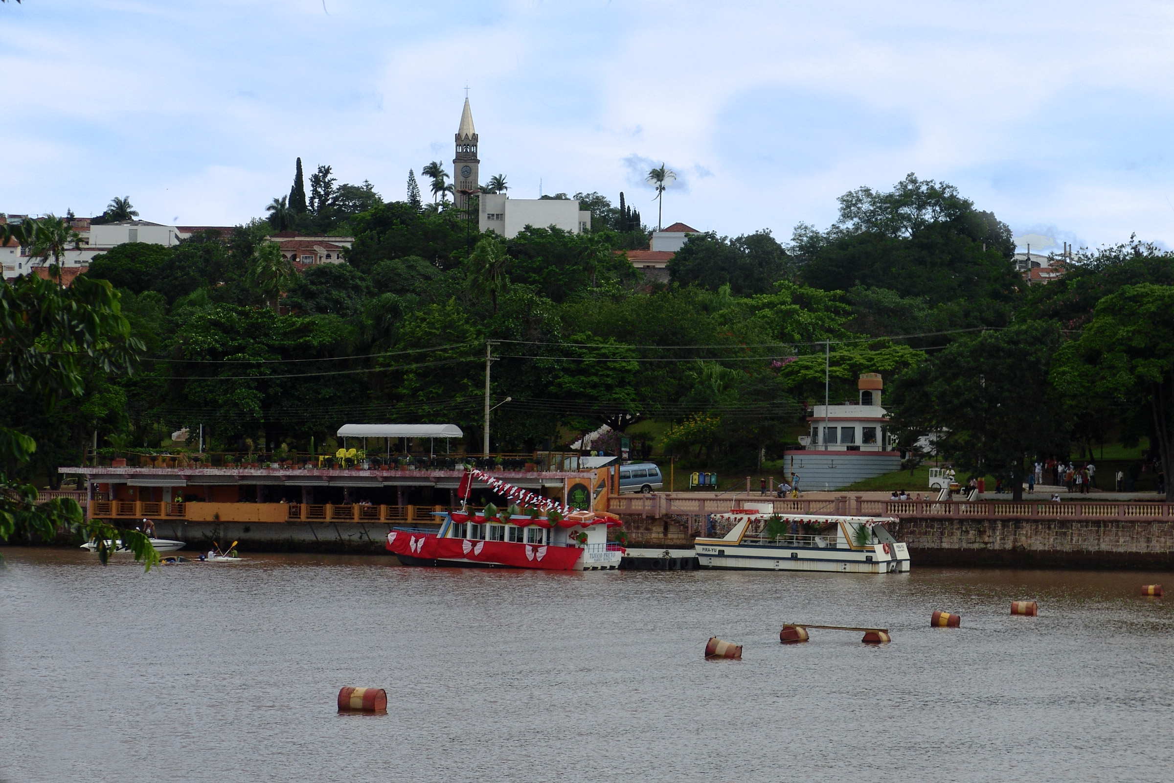 Represa Hidrelétrica do rio Paranapanema em Piraju, São Paulo, Brasil